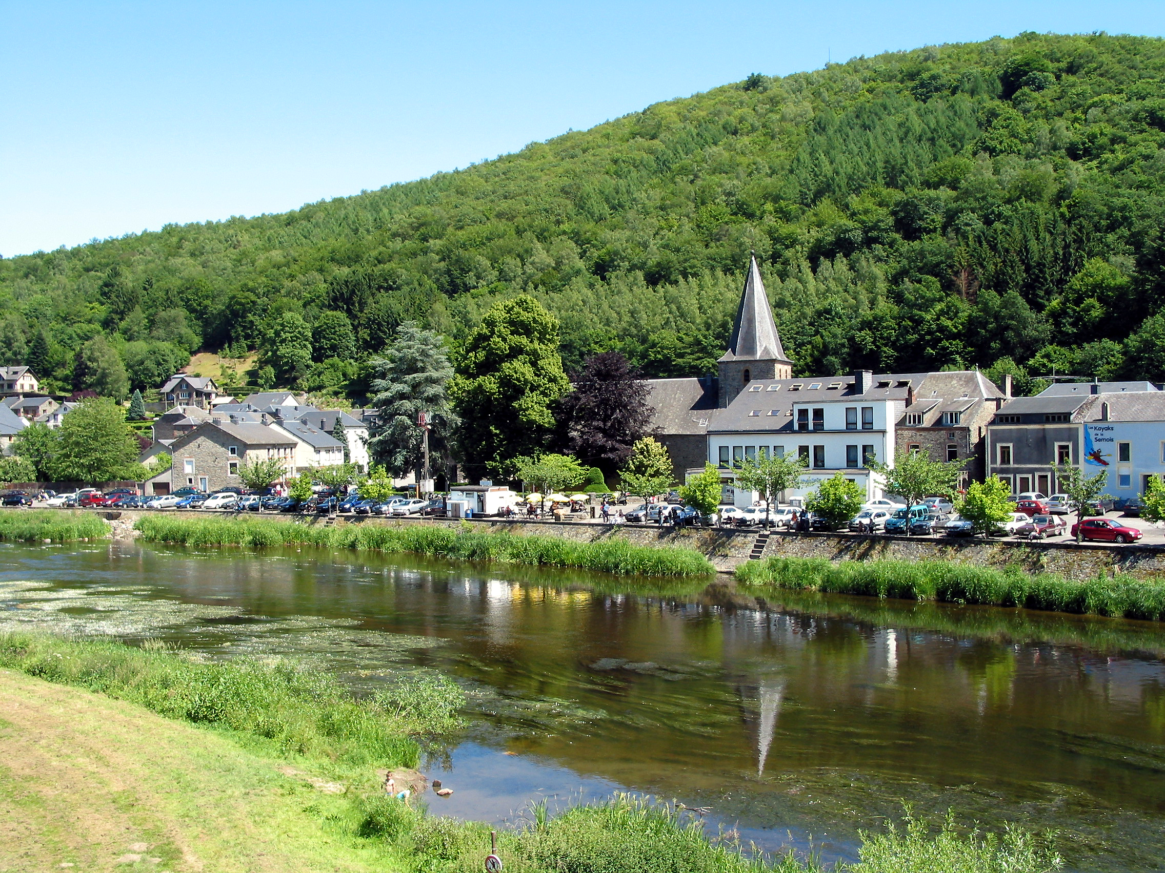 Bohan (Belgique), le village vu du pont sur la Semois